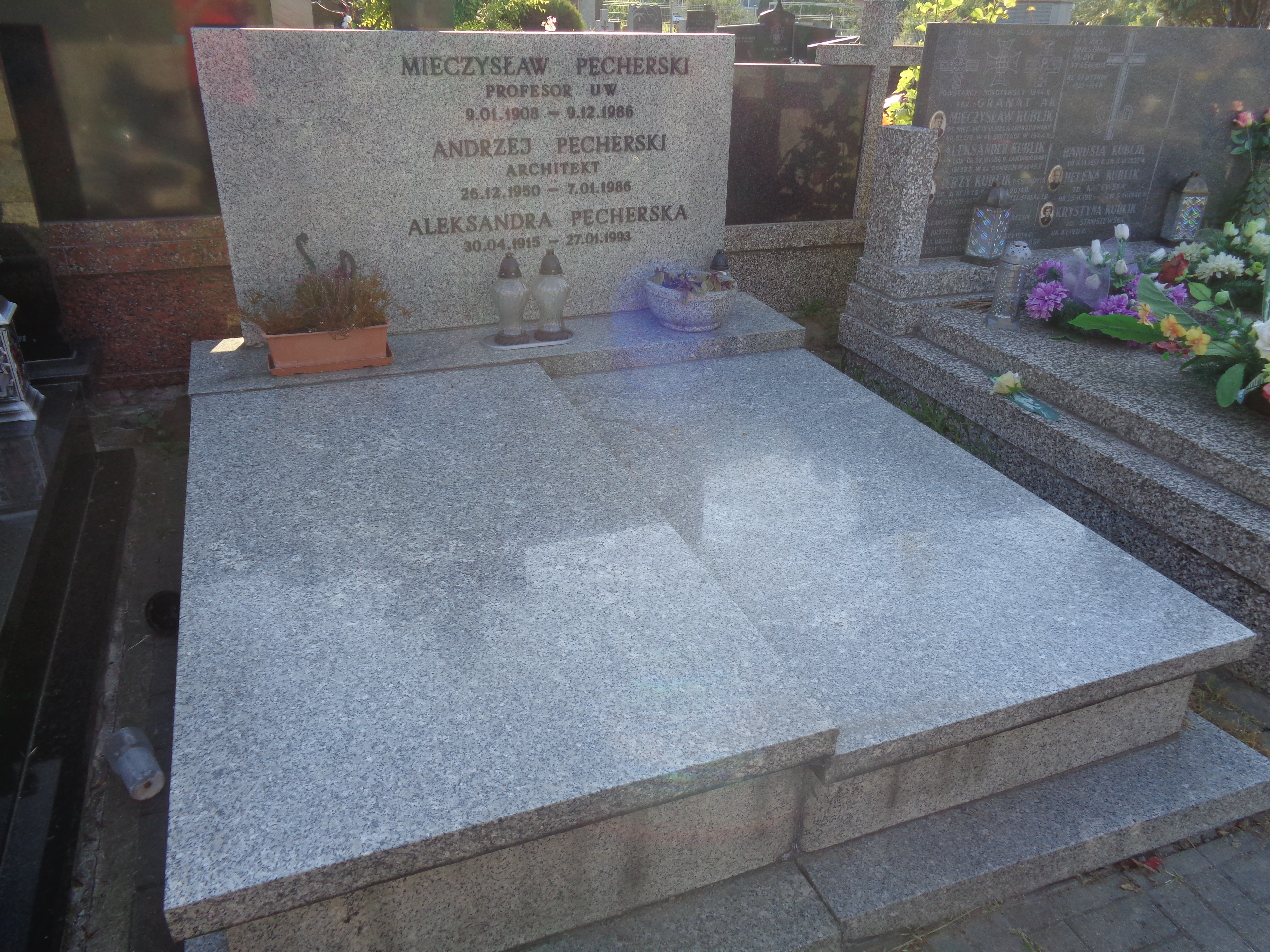 Grób Mieczysława Pęcherskiego na Cmentarzu na Służewie przy ul.Renety